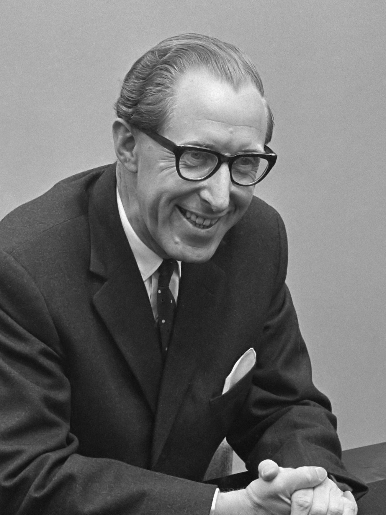 Nederlandse Ambassadeur in Indonesië op Schiphol uit Peking, drs. C. D. Barkman tijdens persconferentie 7 april 1963